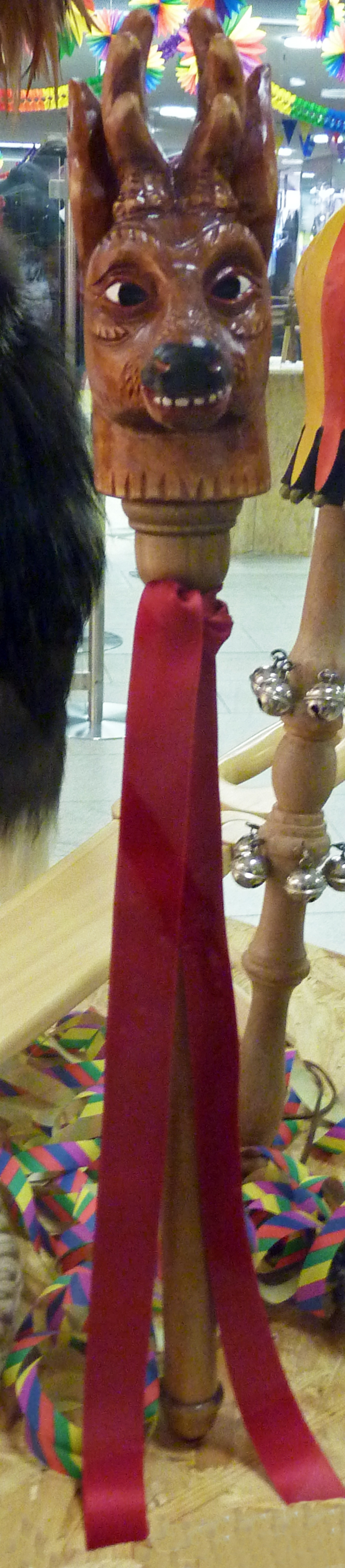 Marotte (Narrenszepter) - Häsrequisit oder Narrenutensil der Narrenzunft Rehbock 1908 e.V., Volkertshausen. Exponat aus der Sammlung Peter Scharte aus der Ortenau, vom 14. Januar bis 13. Februar 2013 im Einkaufszentrum Schwarzwald City (Freiburg) unter dem Titel „Narrenrequisiten - vielfältig und kreativ“ ausgestellt.